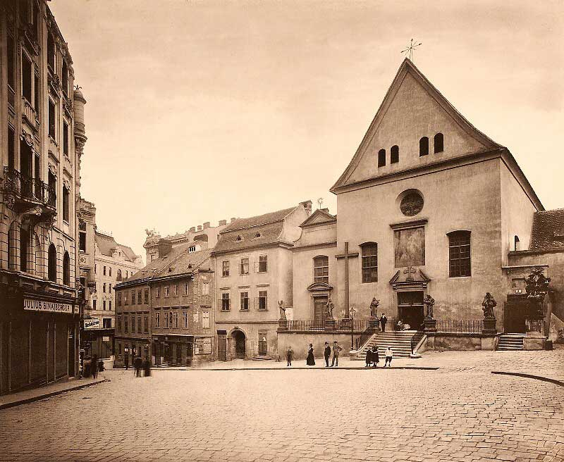 Archivní fotografie kostela nalezení Sv. Kříže v Brně na Kapucínském náměstí.